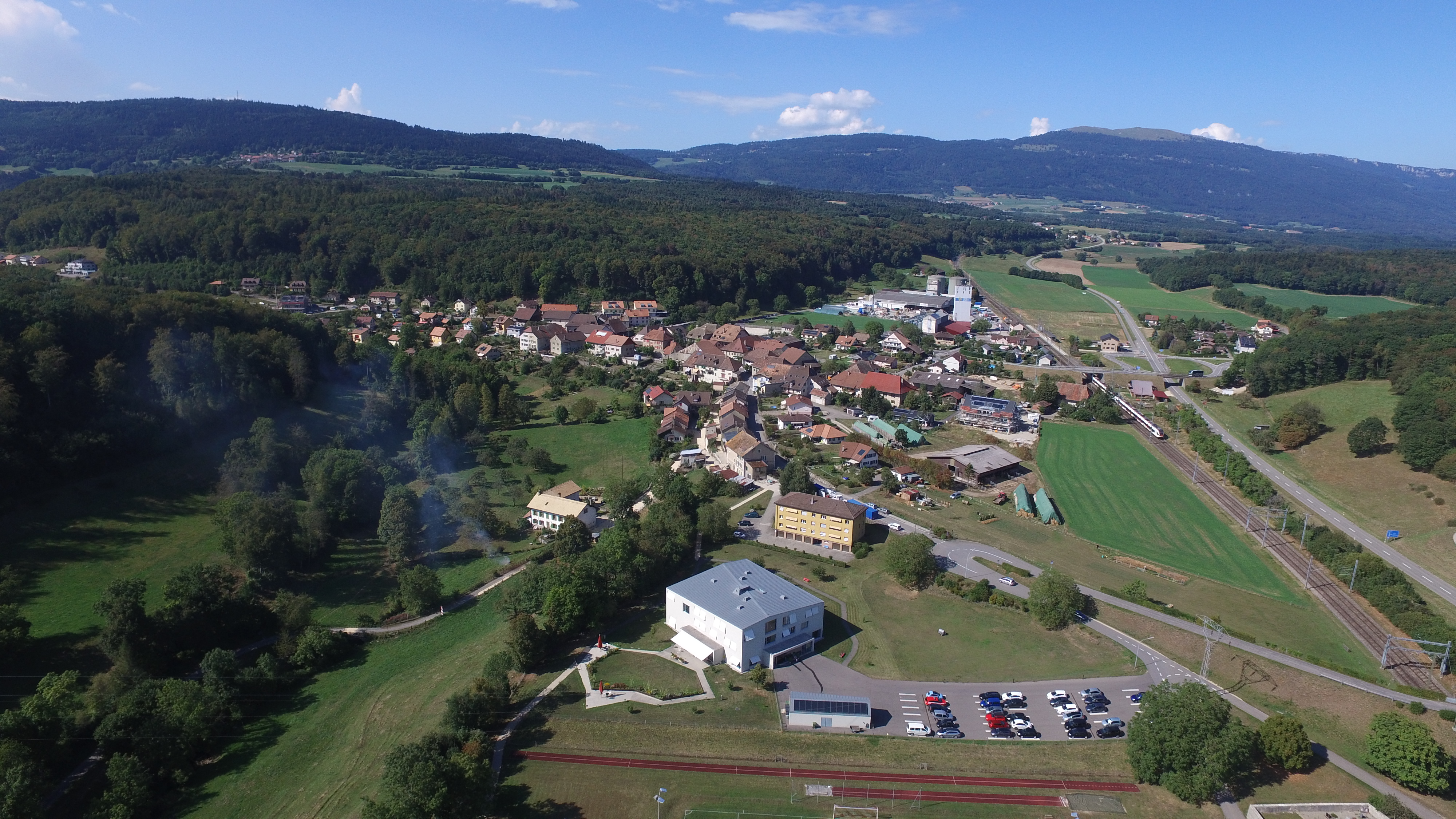 Vue aérienne sud